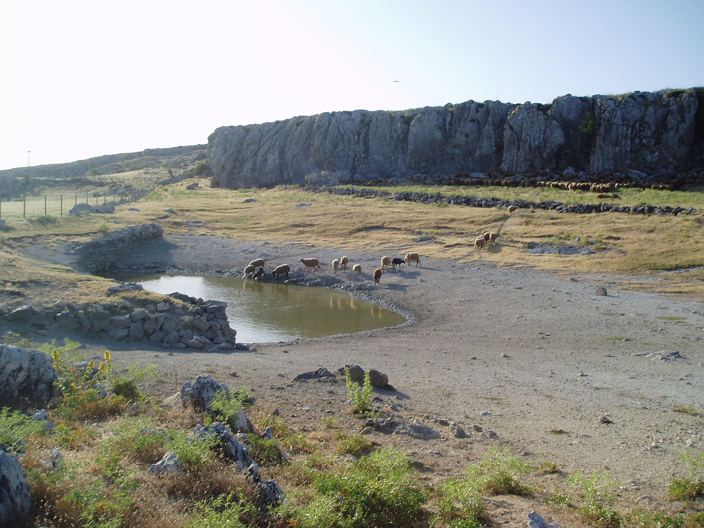 Ovejas junto al Charco del Negro, en la Sierra de Loja, Granada, a 1.400 m de altitud. La vegetación que rodea a la laguna es la típica de una matorral bajo con sierra con algunas zonas de encinares de Quercus rotundifolia y quejigares de Quercus faginea, con retamares formados por Retama sphaercarpa y Genista cinerea junto a tomillares de Thymus orospedanus y Salvia lavandulifolia.